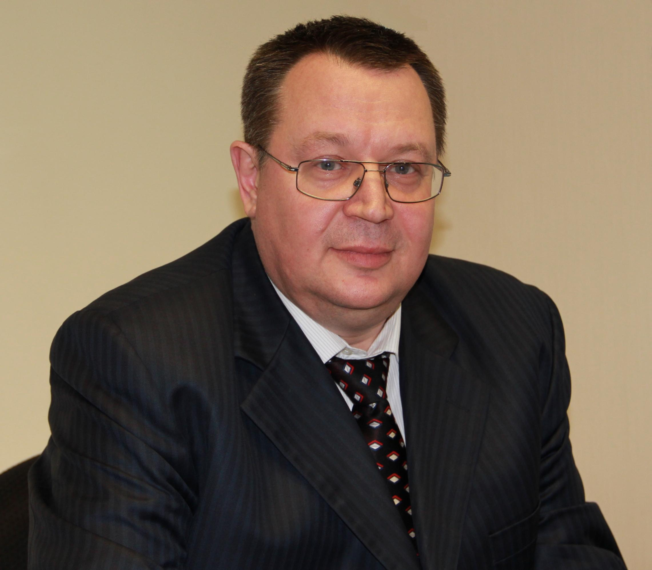 Берман Александр Владимирович